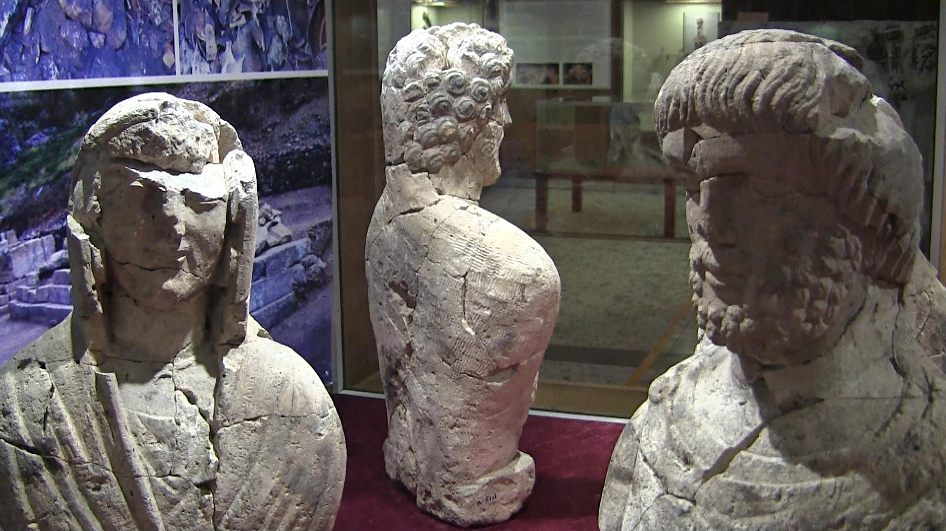 Archäologisches Museum Karaman, Südtürkei, Büsten aus Philadelphia in Kilikien (bei Gökçeseki, Ermenek)